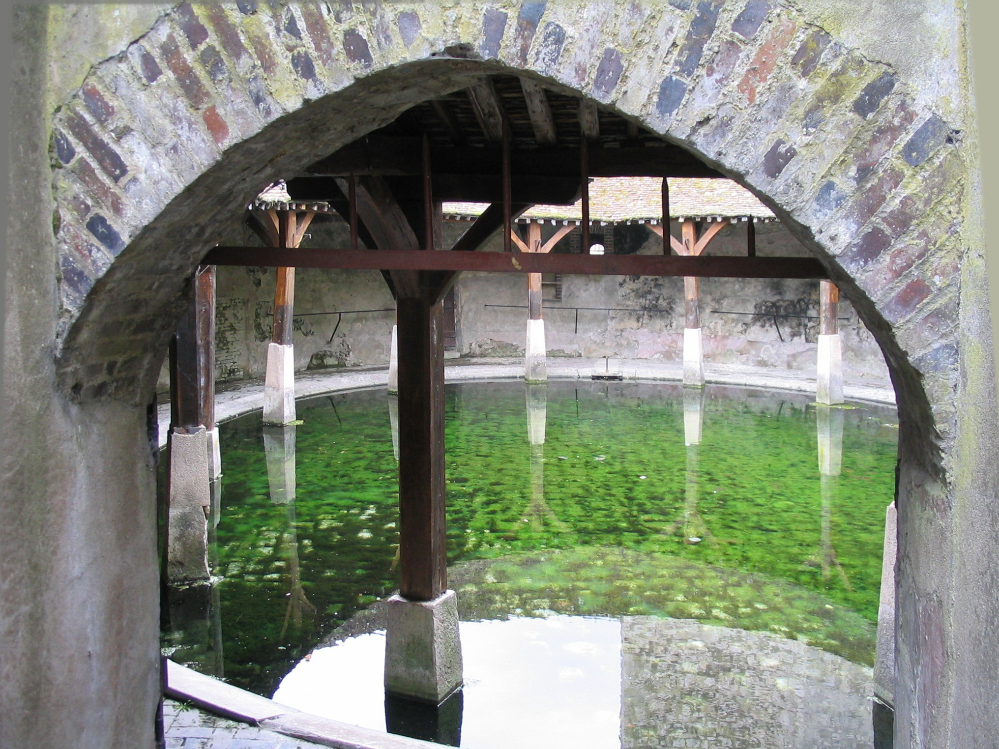 Brienon-sur-Armançon, entrée du lavoir